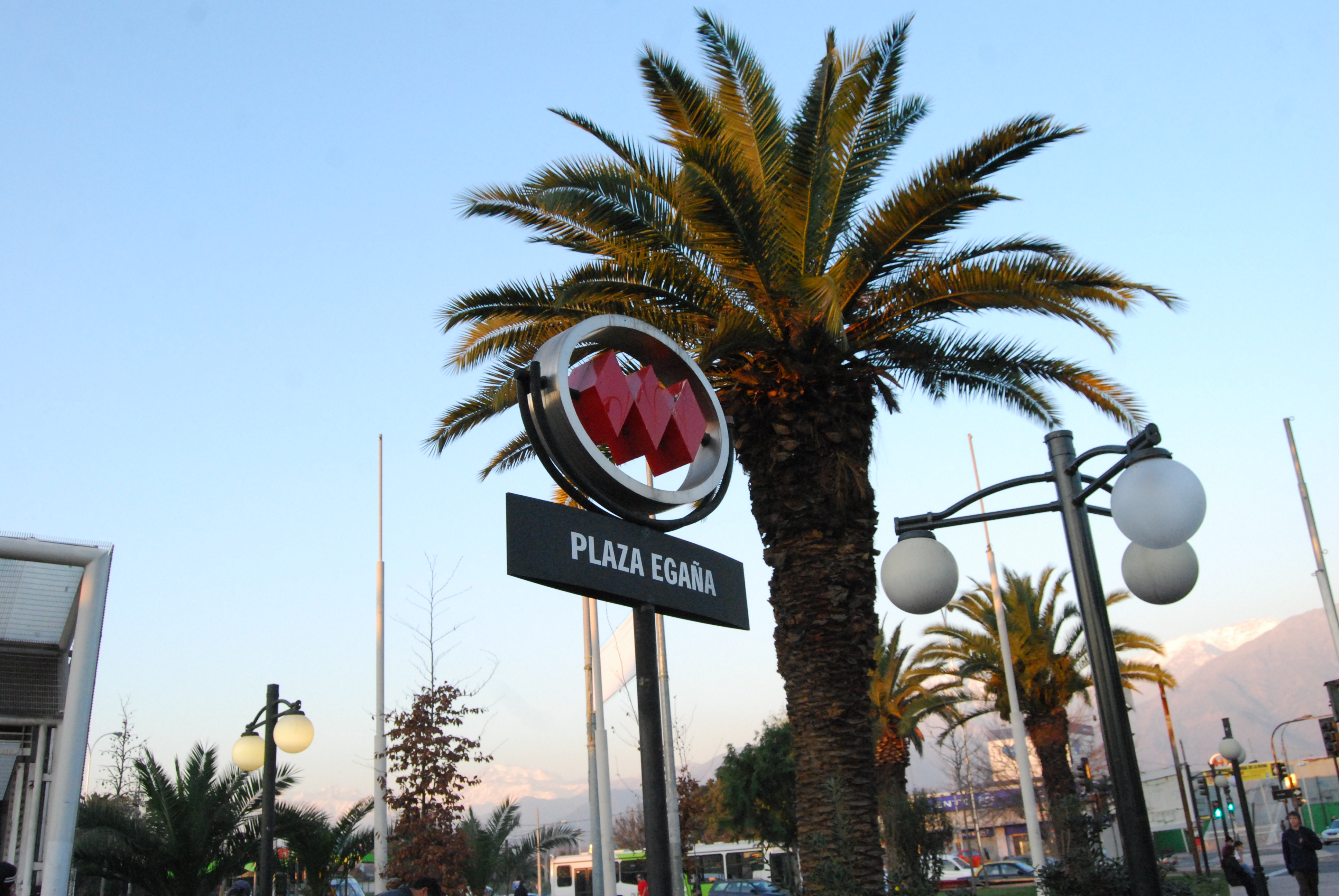 Estación del Metro de Santiago.